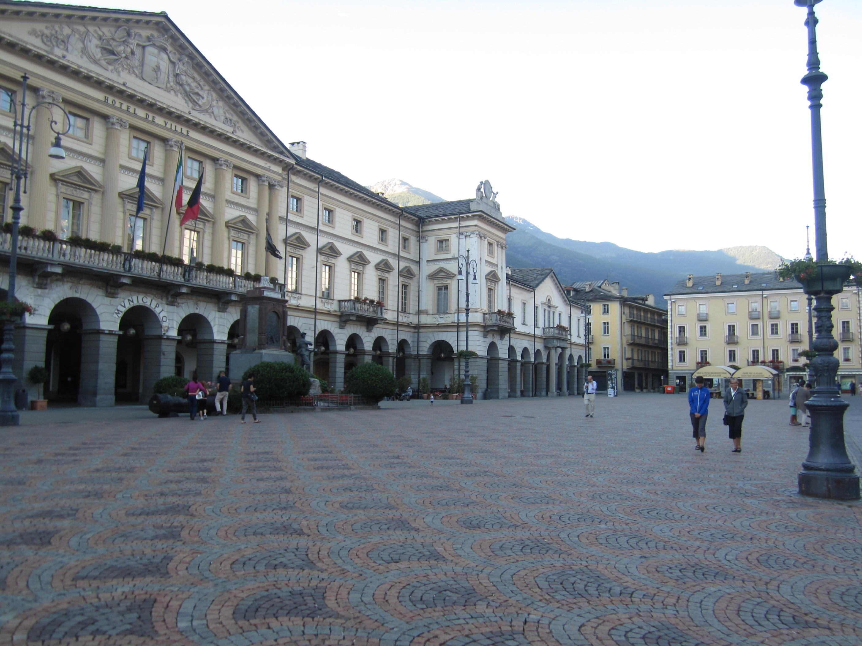 Place Emile Chanoux ad Aosta